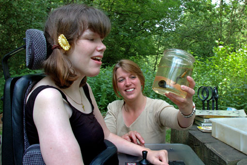 Begeistert die Natur erleben auf NaturGut Ophoven